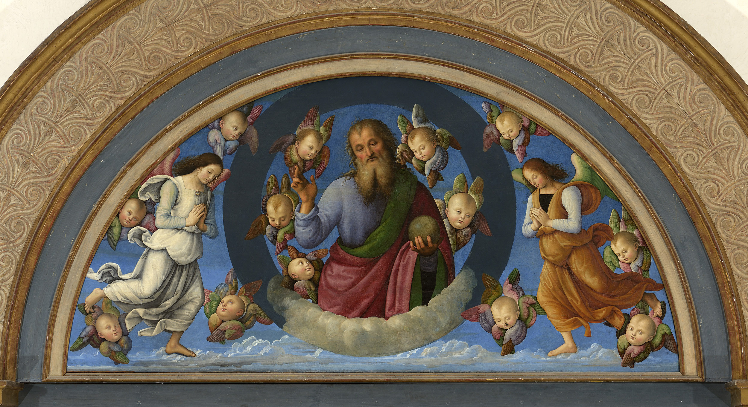 Pérugin, L'Ascension du Christ cercle supérieur